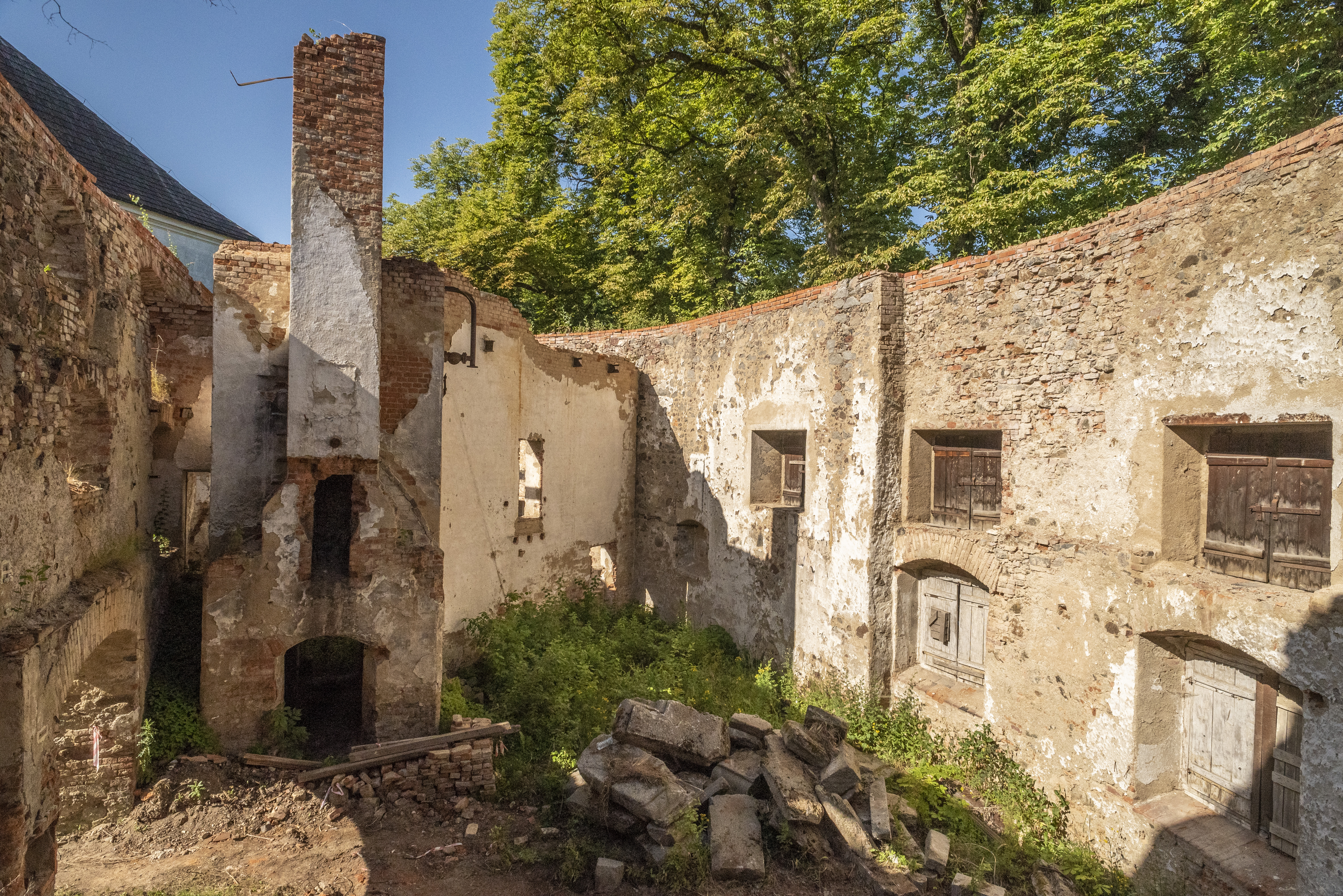 Zámek Rožmitál pod Třemšínem